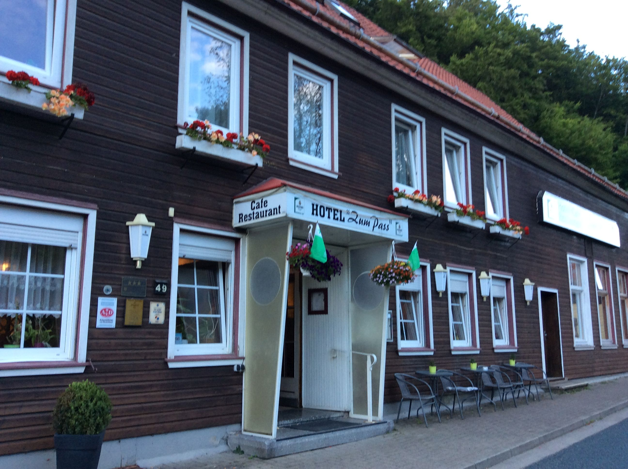 Esperanto-hotelo en Sieber (DE)